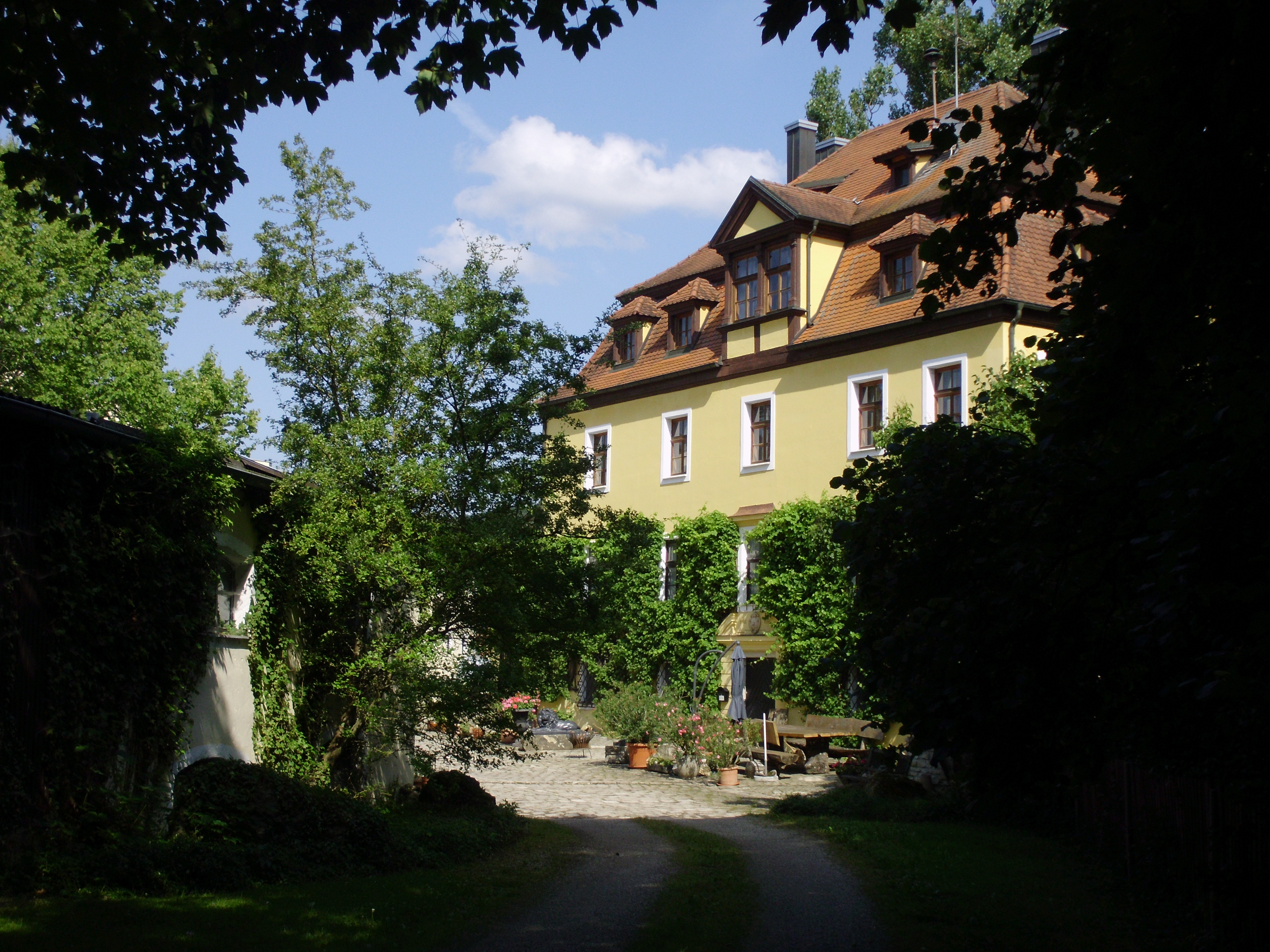 Feldmühle, Gutshof und Ortsteil von Rennertshofen im Landkreis Neuburg-Schrobenhausen